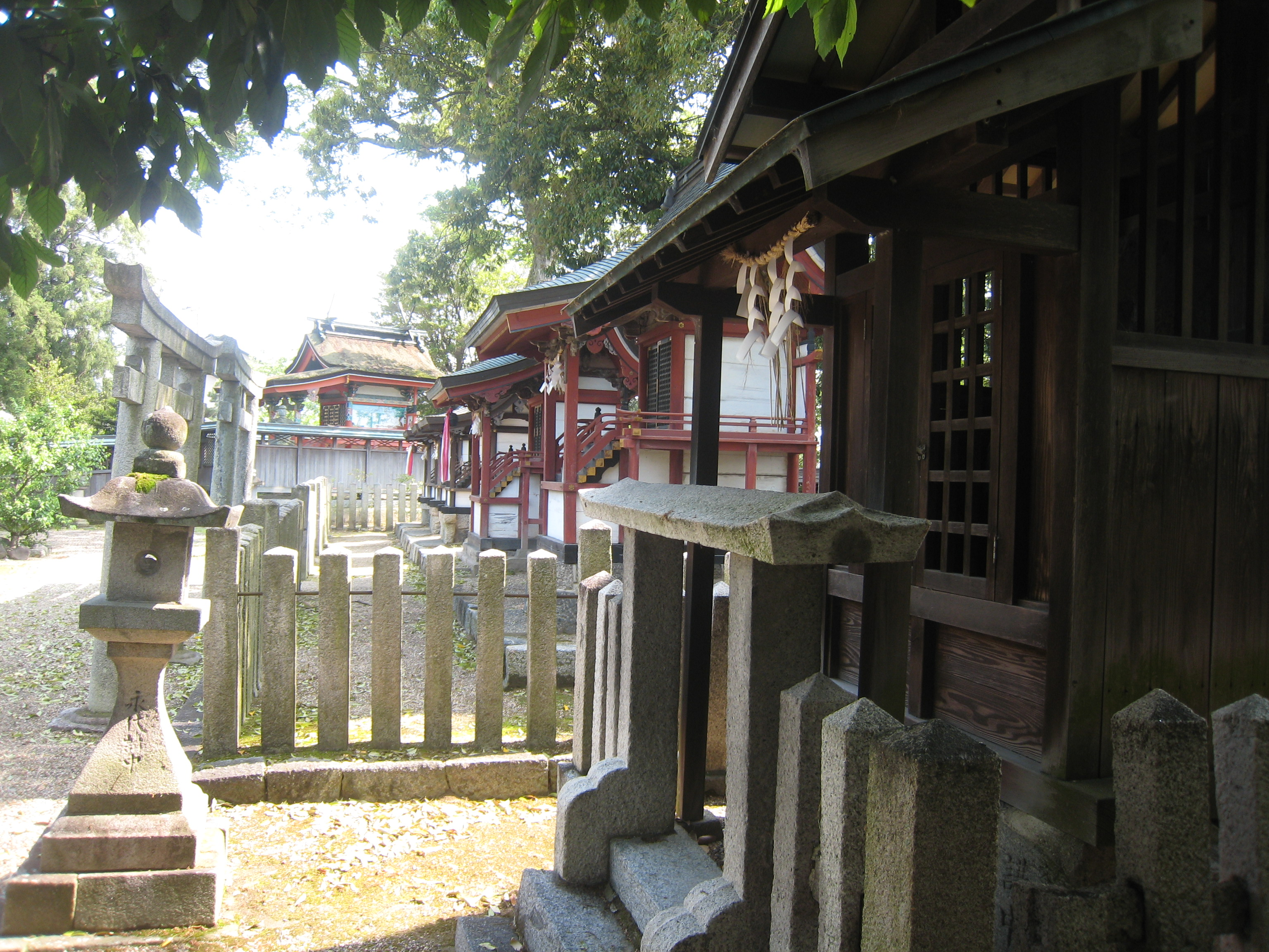 今井町の氏神